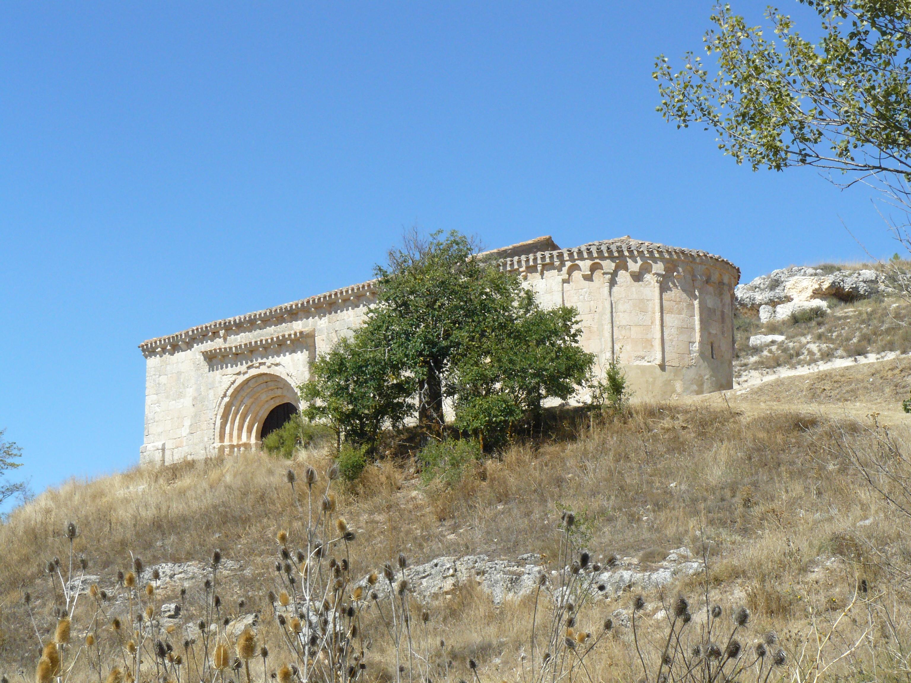 Santibáñez de Esgueva, Burgos.